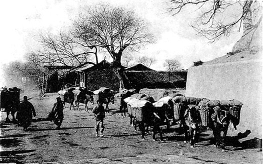 photo from Ein Tagebuch in Bildern